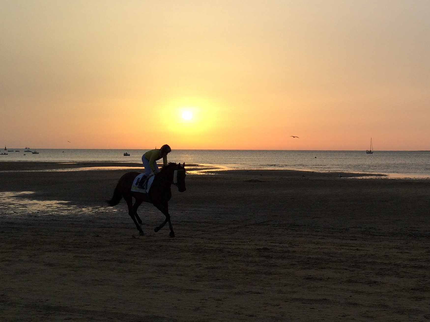 Caballo en la playa de Sanlúcar de Barrameda (Cádiz, España) calentando antes de una carrera. Agosto de 2016.